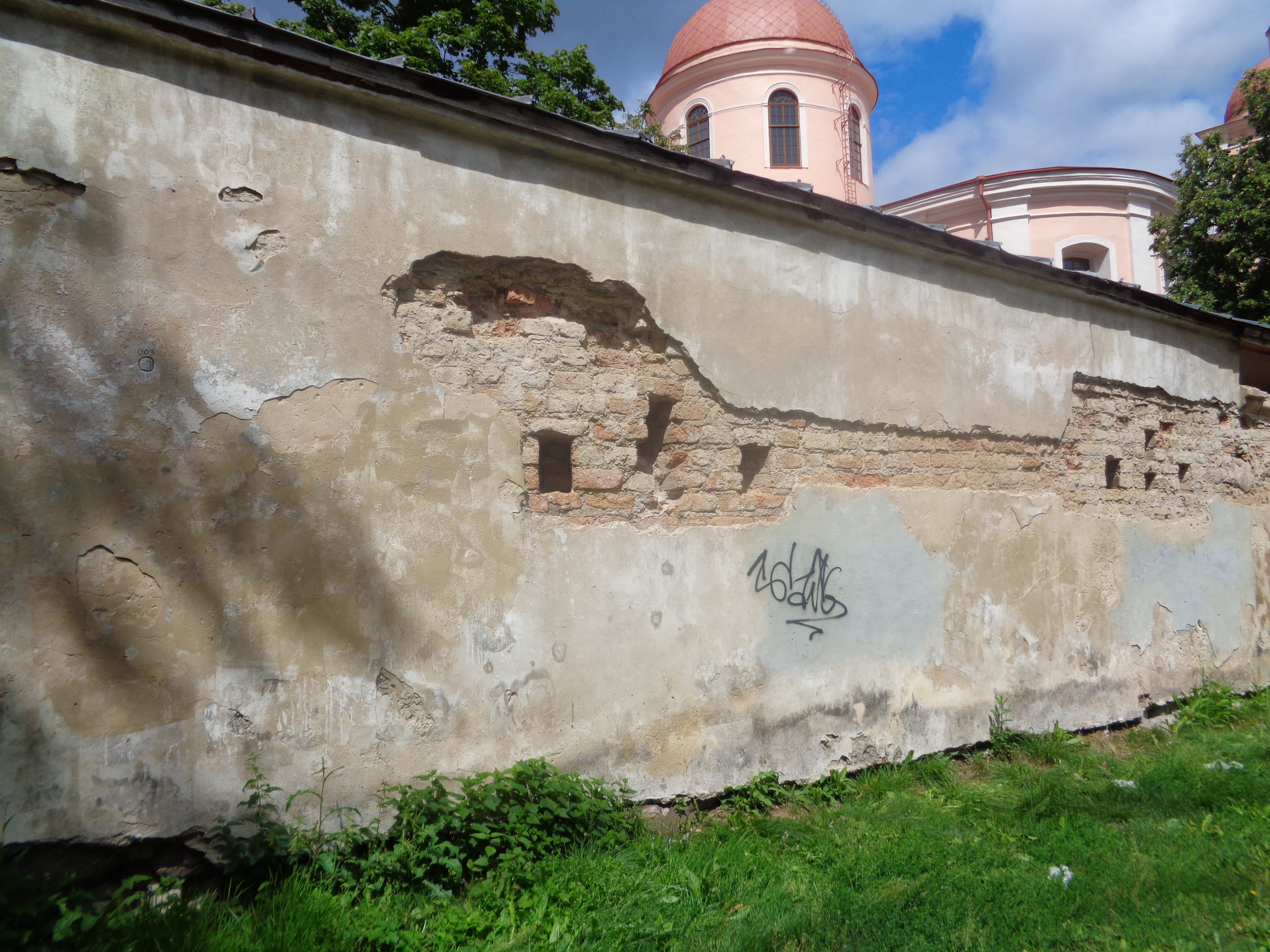 Сохранившийся отрезок городской стены на улице Швянтосёс Двасёс, образующий ограду ансамбля православного Свято-Духова собора и монастыря, с оставшейся нижей частью стены и остатками бойниц